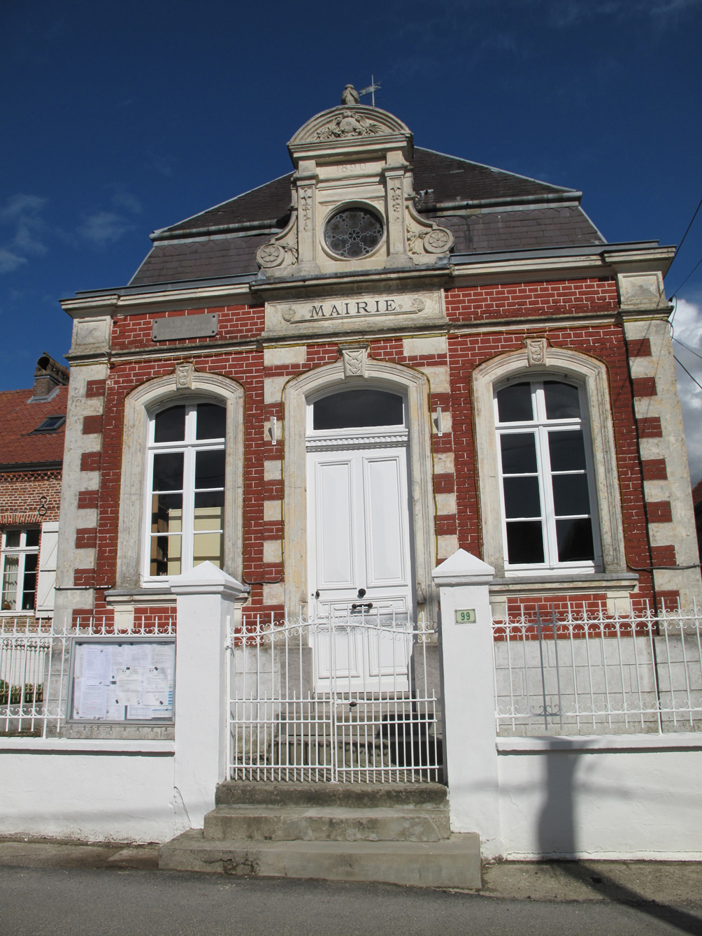 Bernieulles mairie